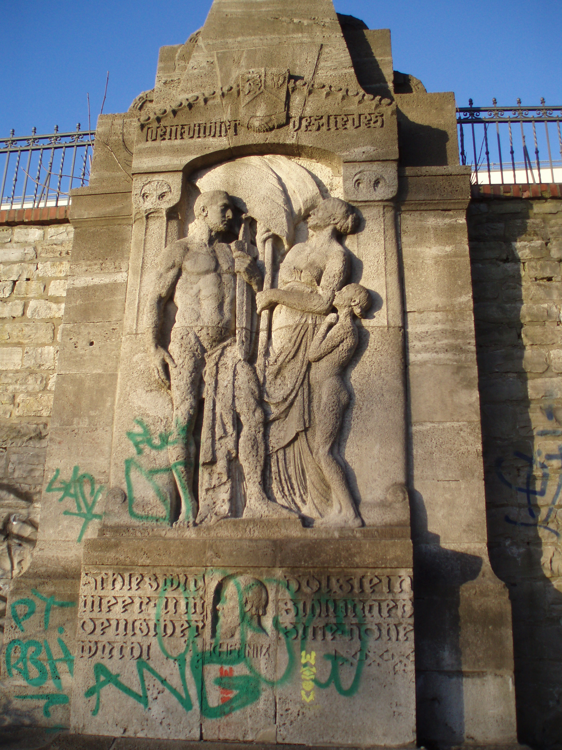 Chemnitz-Bellmann-Brunnen (1909) von Hermann Hausmann (1865-1907) und Otto Stichling (1866–1912) an der Stützmauer der Rainvilleterrasse in Hamburg-Ottensen Inschrift: dem Dichter des Liedes Schleswig Holstein meer-umschlungen deutscher Sitte hohe Wacht